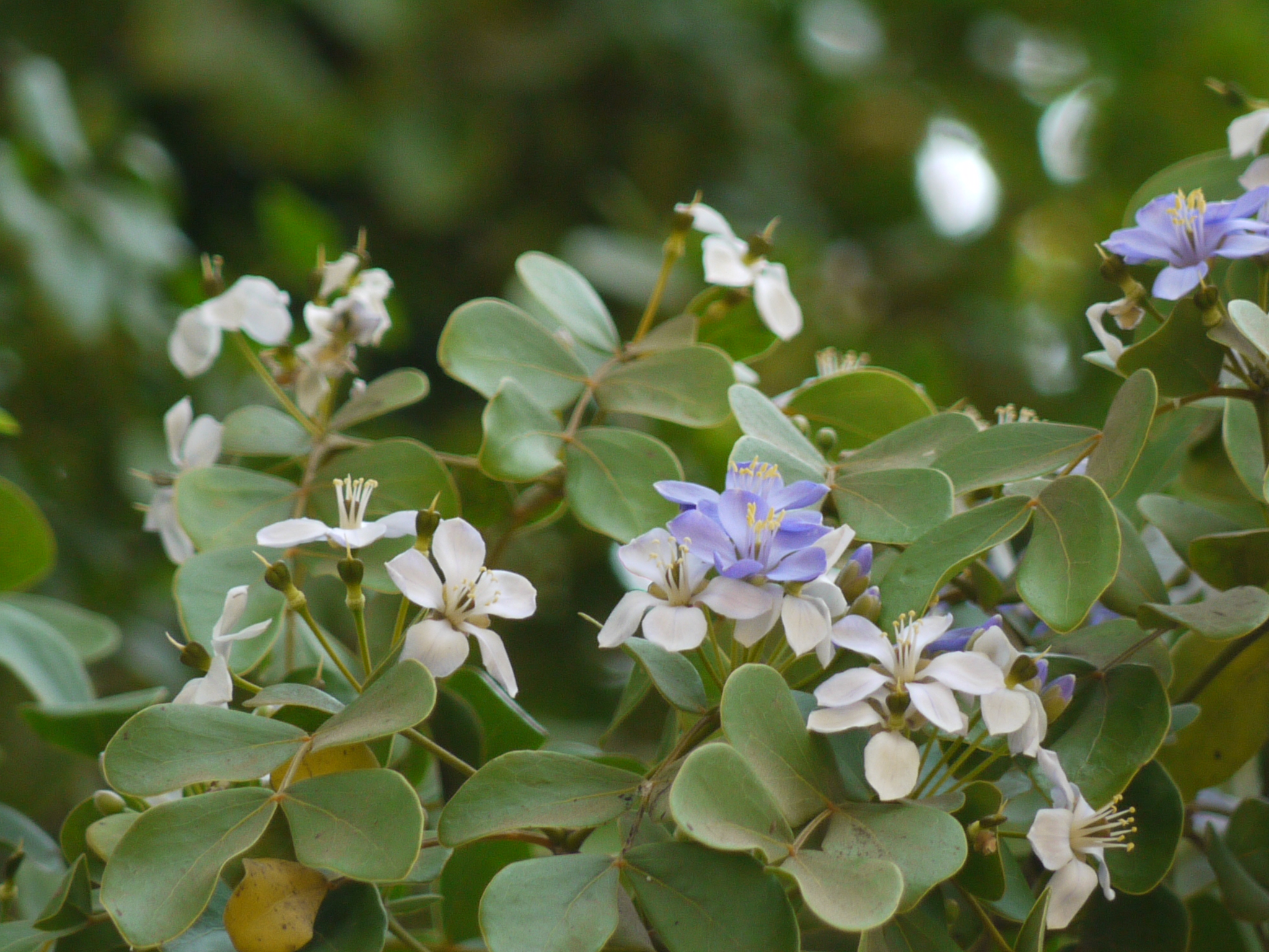 Guaiacum officinale